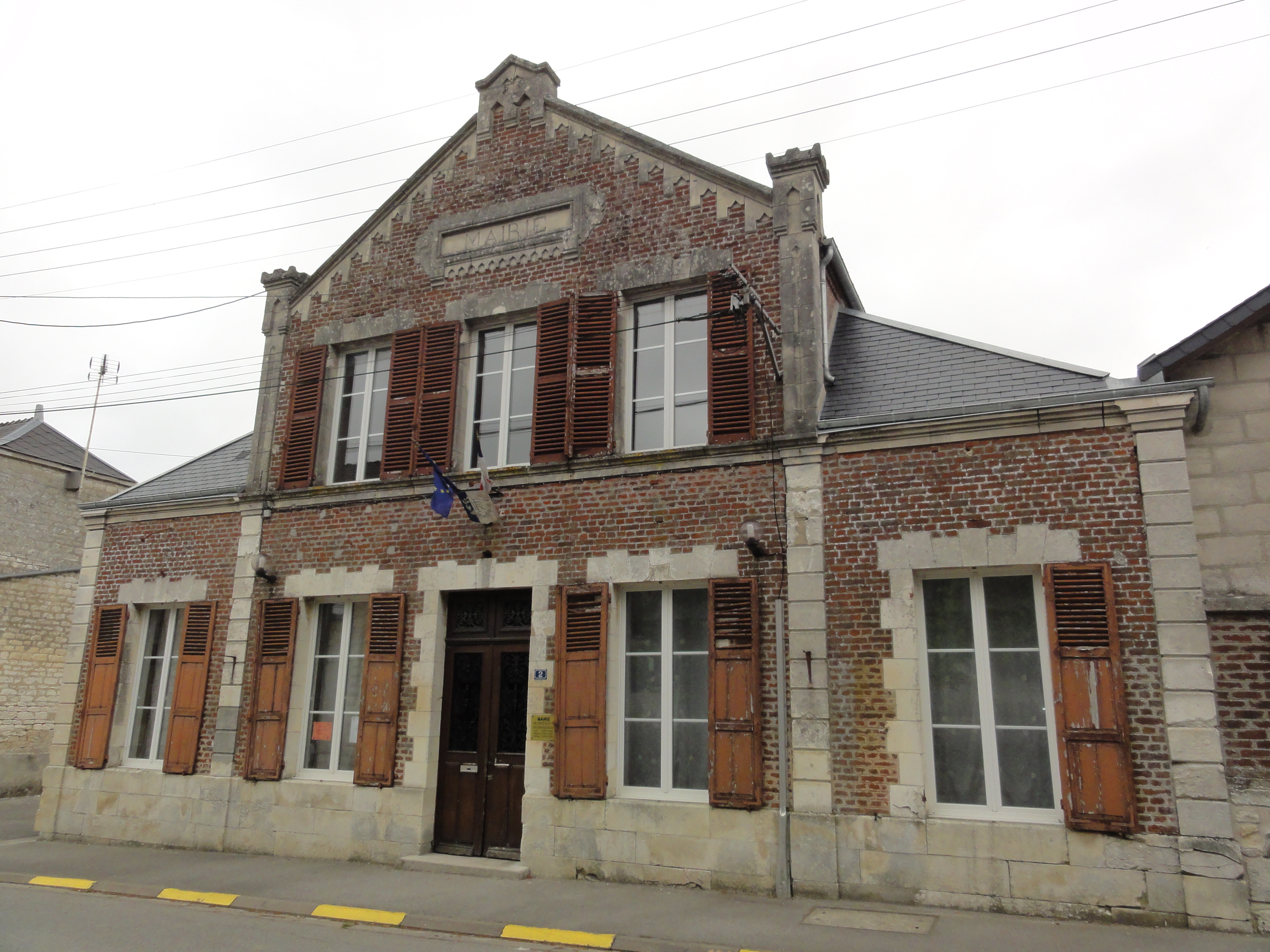 La Malmaison (Aisne) mairie